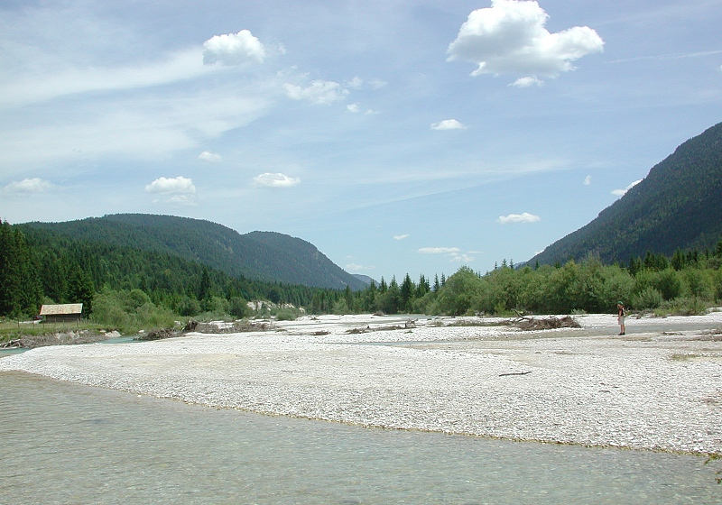 Isar-Tal zwischen Mittenwald und Vorderriß, Bayern, Deutschland